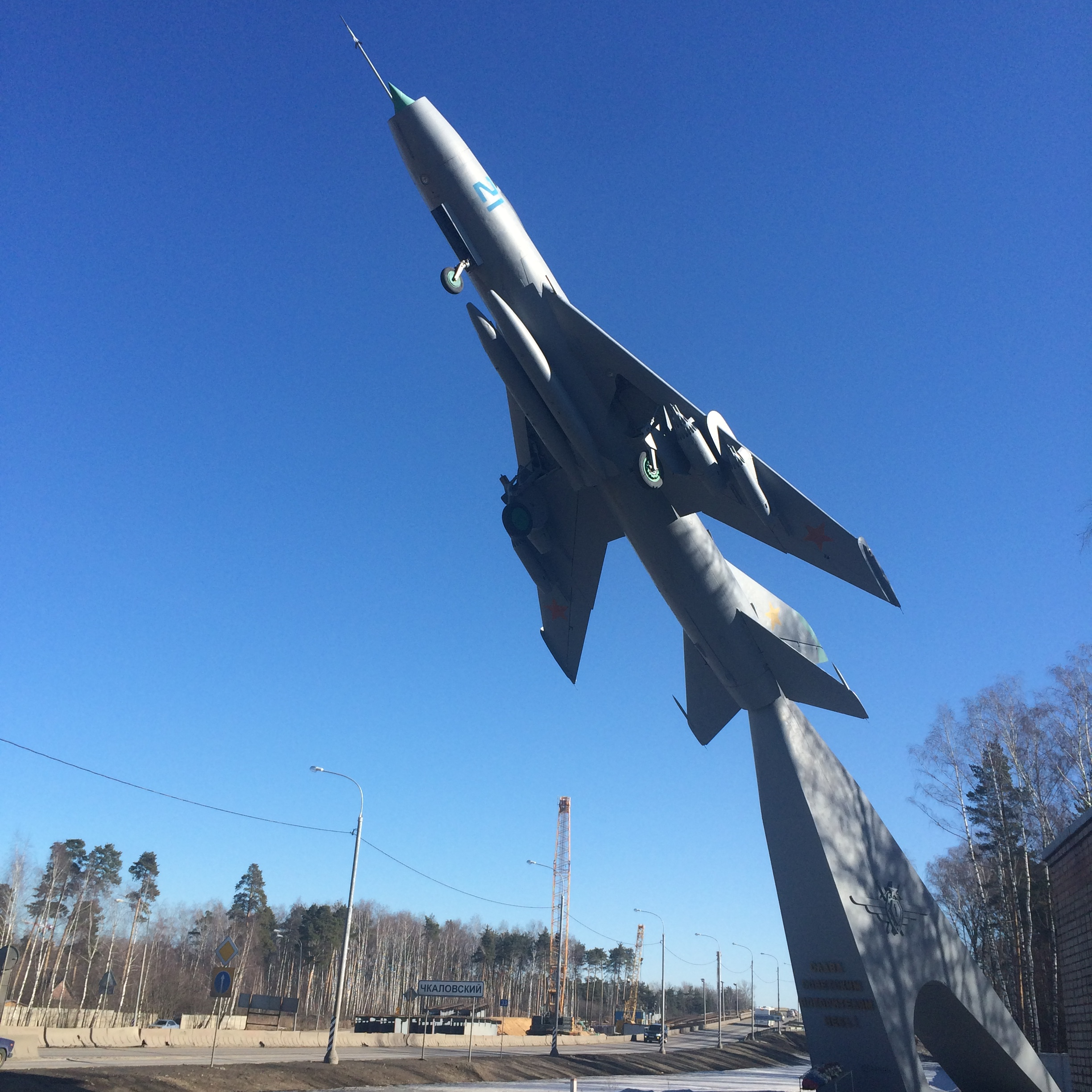 Памятник "Слава советским покорителям неба" самолет Су 7Б на Щелковском шоссе